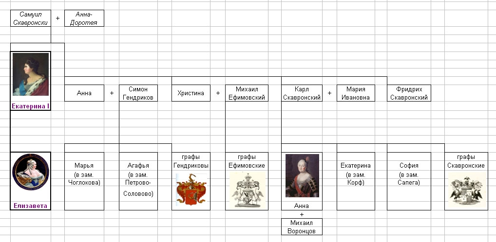 Двоюродные сестры Елизаветы Петровны